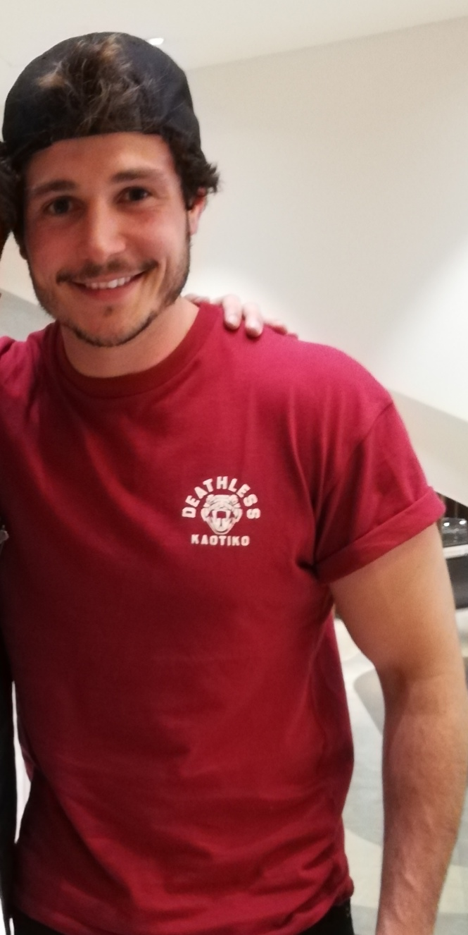 Miki, rappresentante della Spagna all'Eurofestival 2019, al Pre-Party di Mosca 🇪🇸